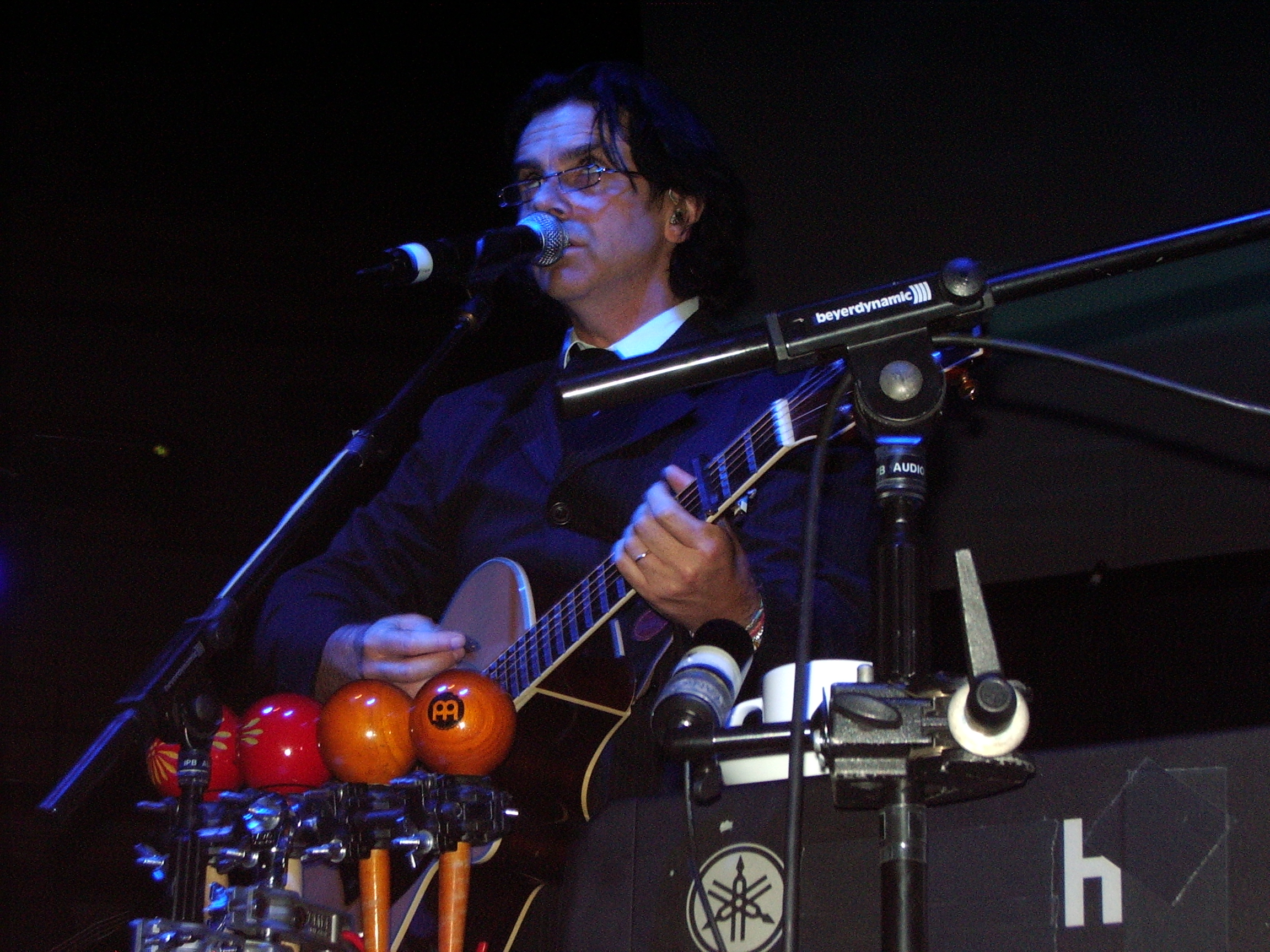 Steve Hogarth, Vredenburg, 16 september 2004. Gemaakt door Saskia van den Kieboom